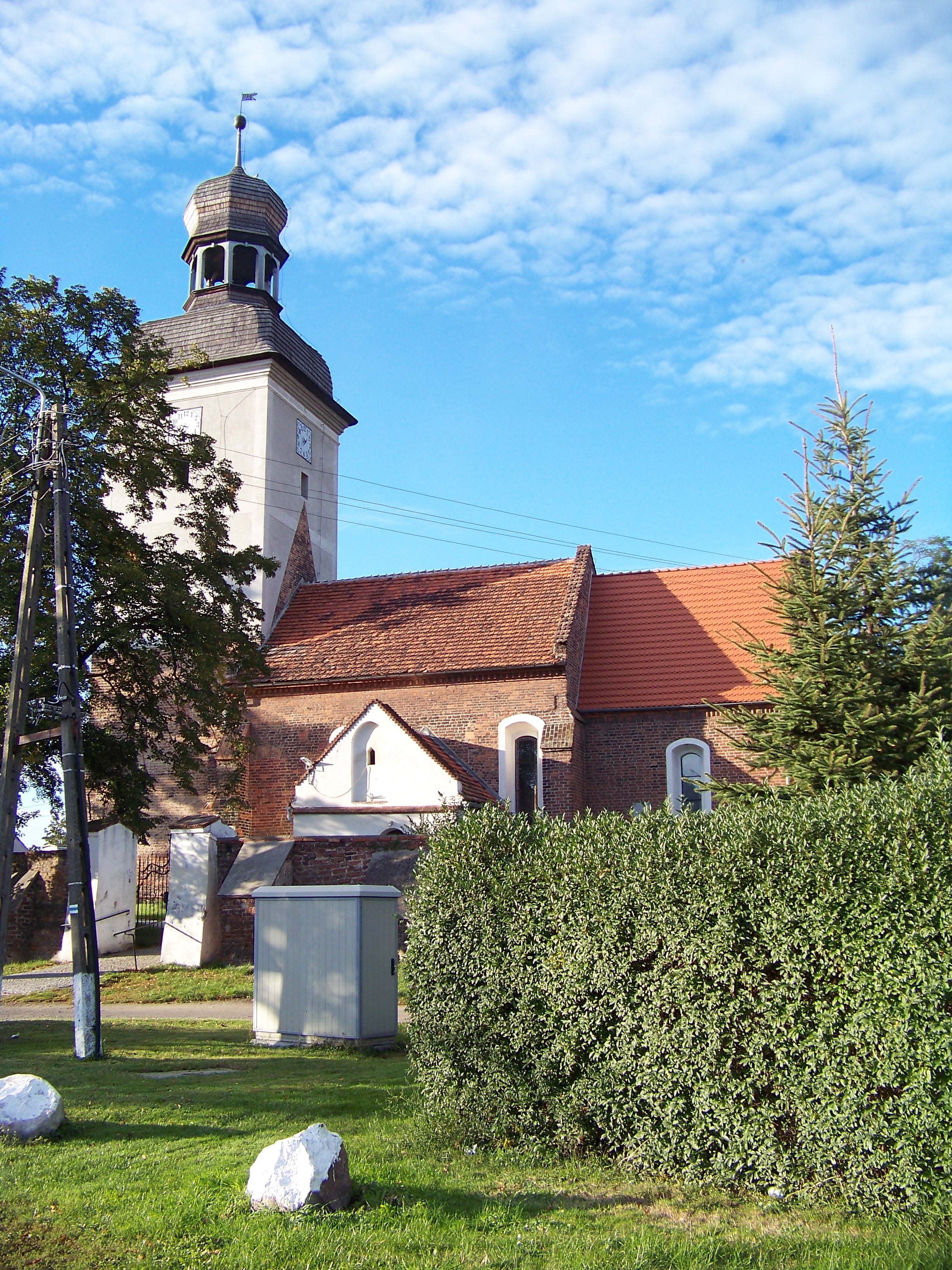 Strzelniki - kościół filialny p.w. św. Antoniego, widok z profilu (zabytek nr 708/64 z 02.03.1964)